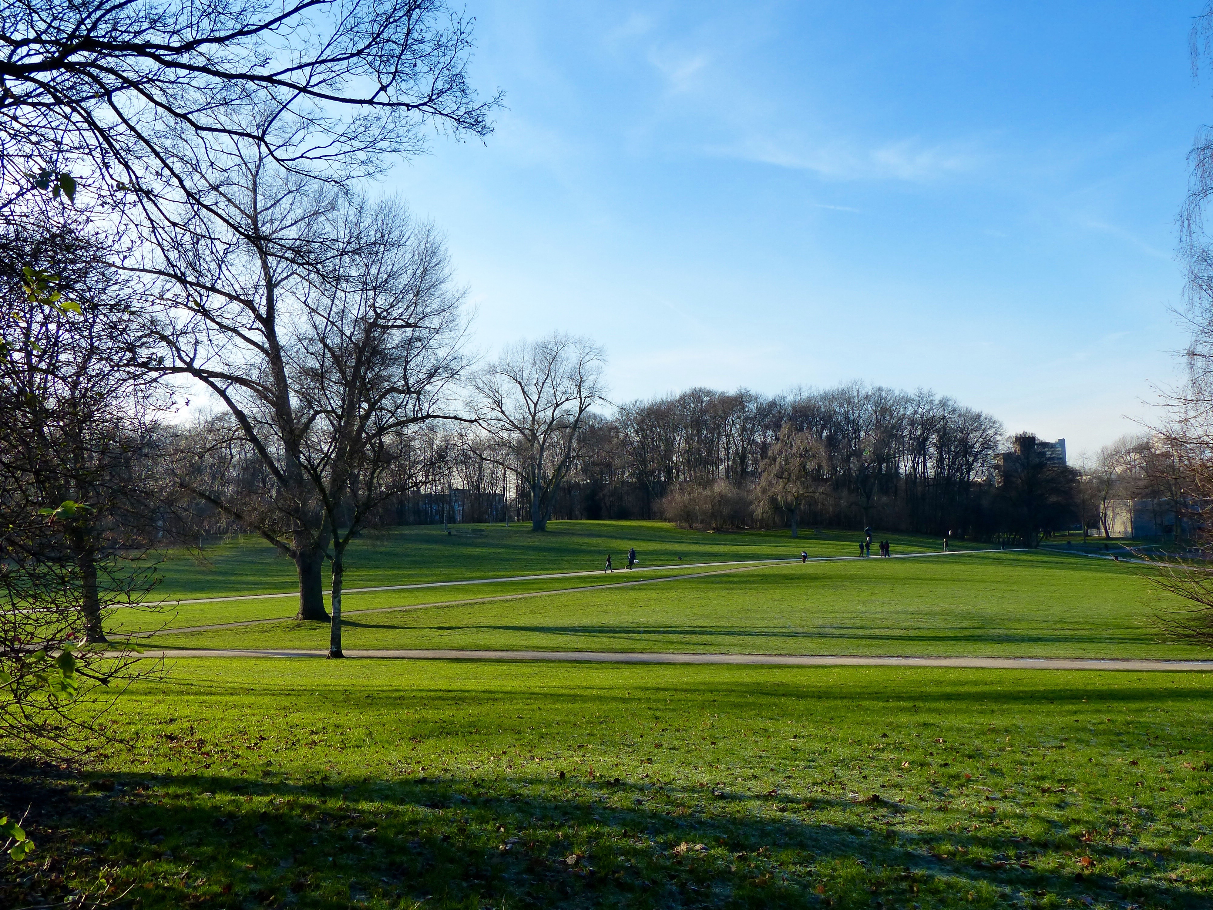 Hiroshima-Nagasaki-Park in Köln